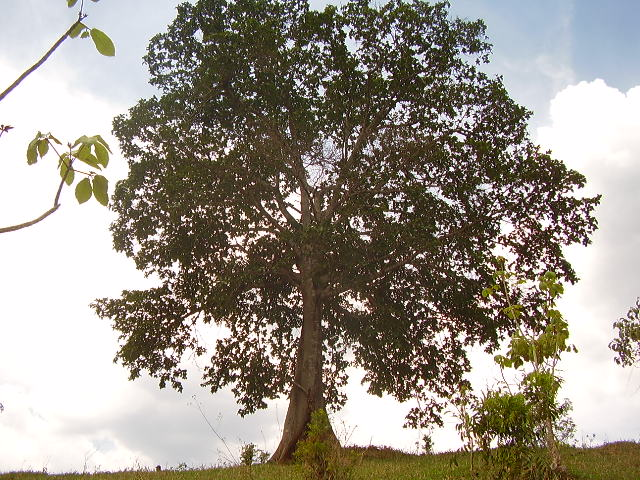 Esta é uma árvore da gameleira, do gênero Ficus.